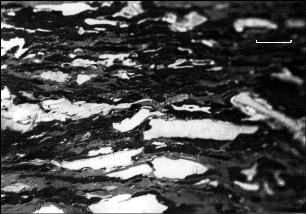 Фото